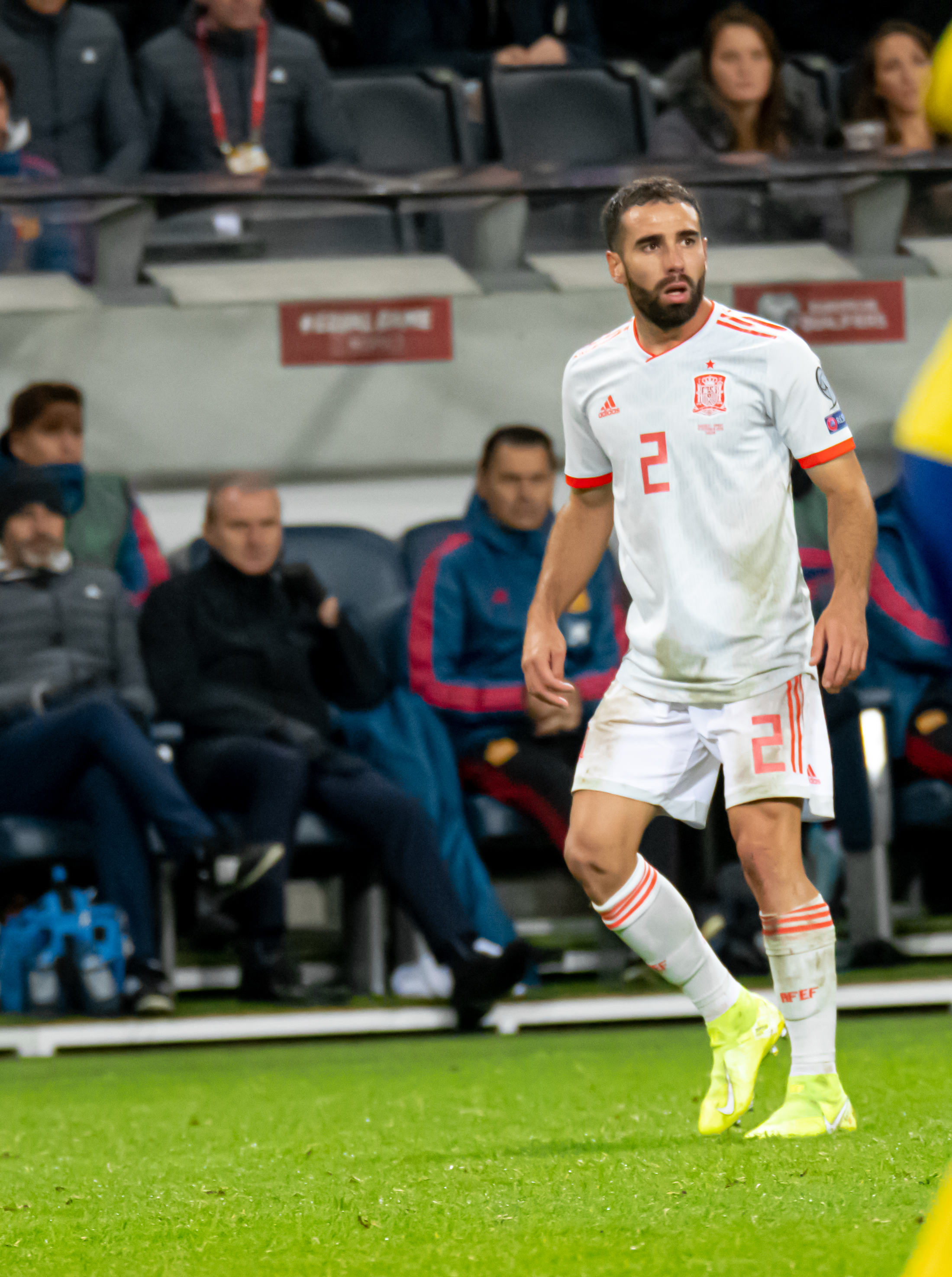 UEFA EURO qualifiers Sweden vs Spain 20191015